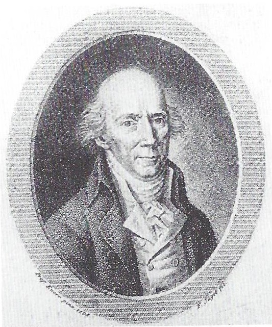 Zeichnung von Johann Georg Scheffner (1736-1820).